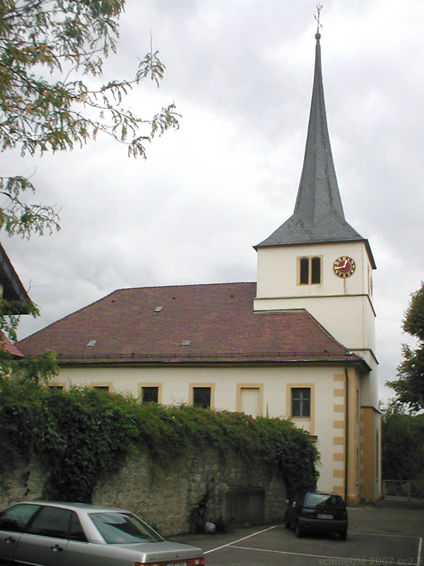 Ev. Kirche St. Cornelius und Cyprian in Heilbronn-Biberach, Baden-Württemberg, Deutschland